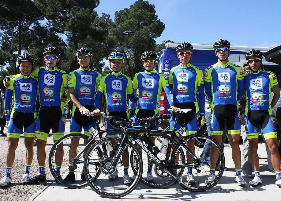 Equipo ciclista 472-Colombia en la Vuelta a Castilla y León 2013 Depicted people: Ever Rivera, Carlos Urán, Sebastián Salazar, Juan Ernesto Chamorro, Jesús Castaño, Camilo Suárez, Juan Pablo Villegas and Edson Calderón